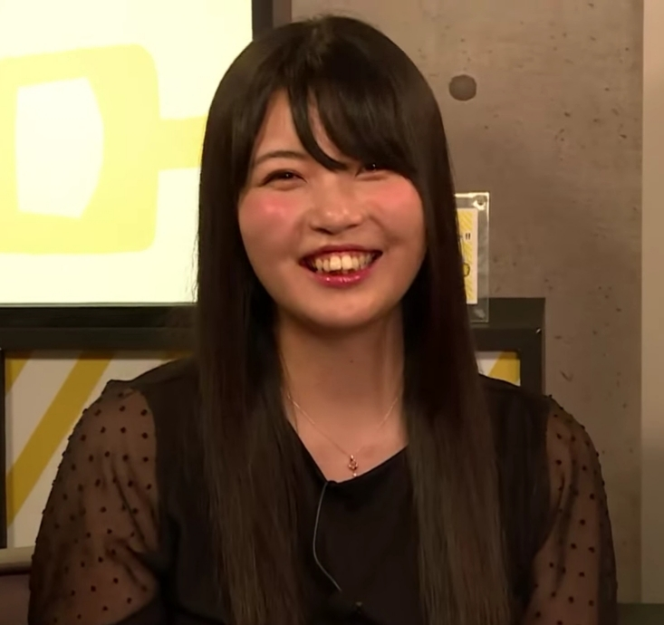 Recorte de foto de video de Commons